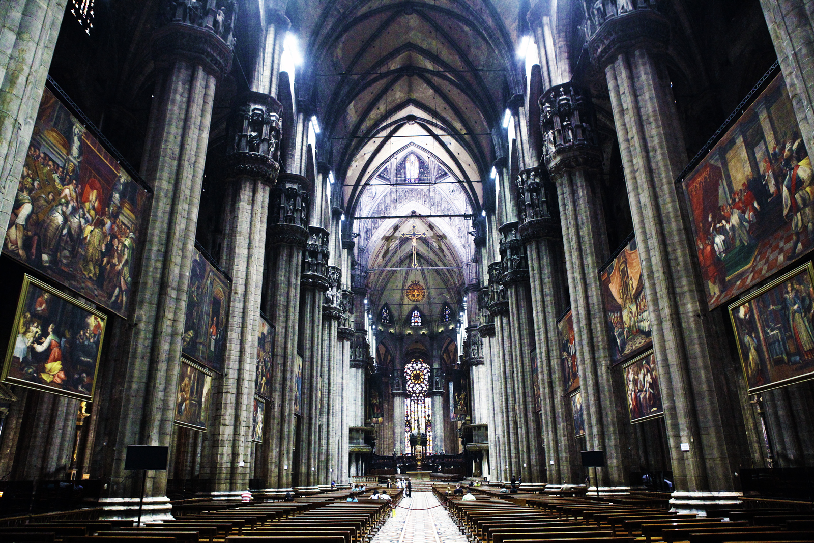 米兰大教堂